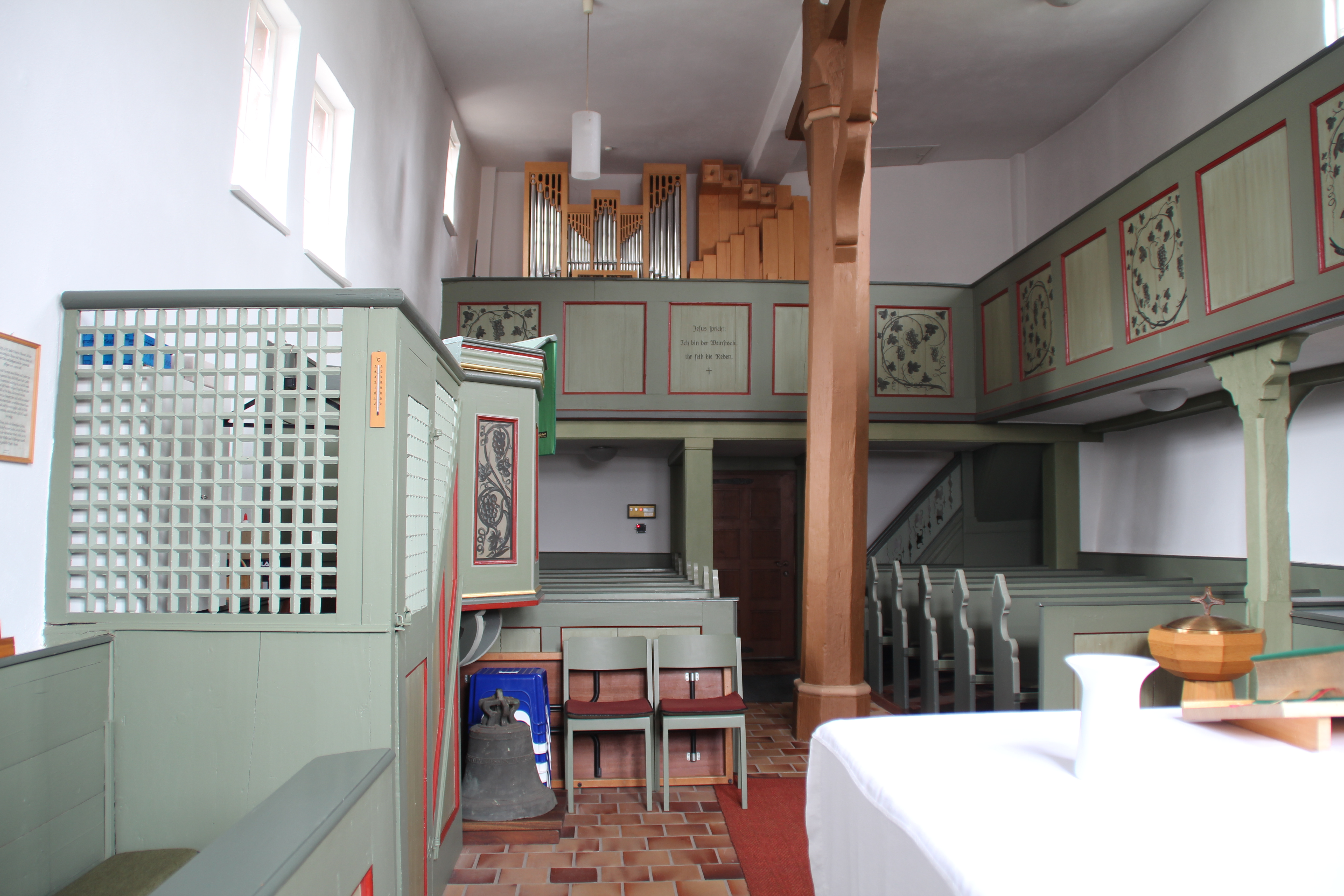 Kanzel der Ev. Kirche Reinhardshain, Grünberg, Gießen, Hessen, Deutschland